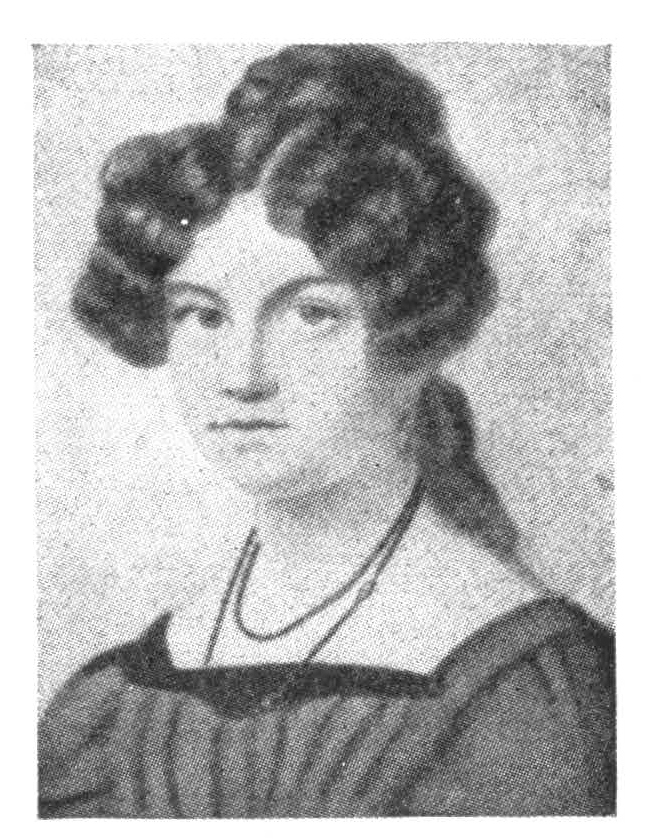 Pastellzeichnung, die Henriette Voigt (1808-1839) zeigt